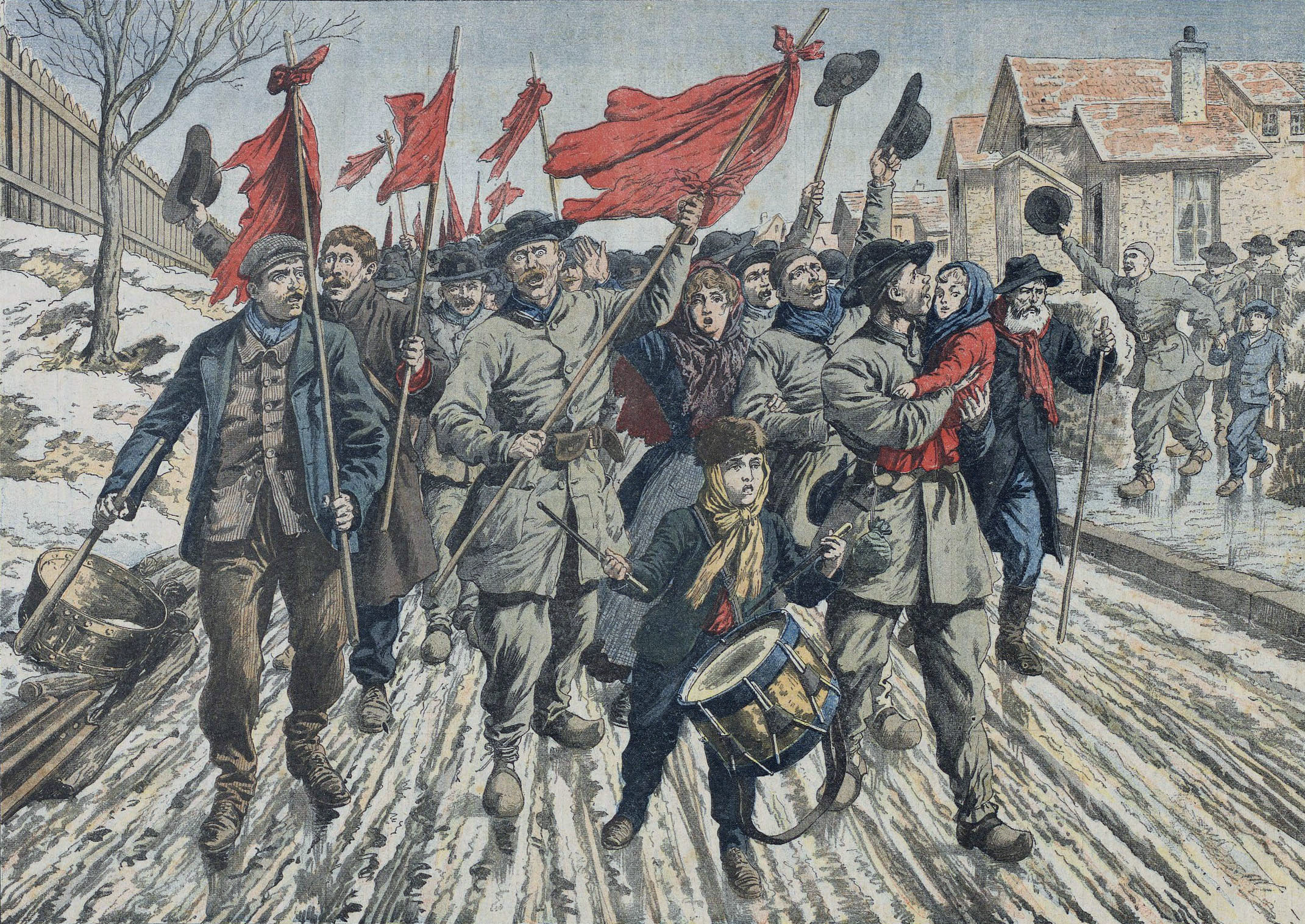 La grève des mineurs du Pas-de-Calais